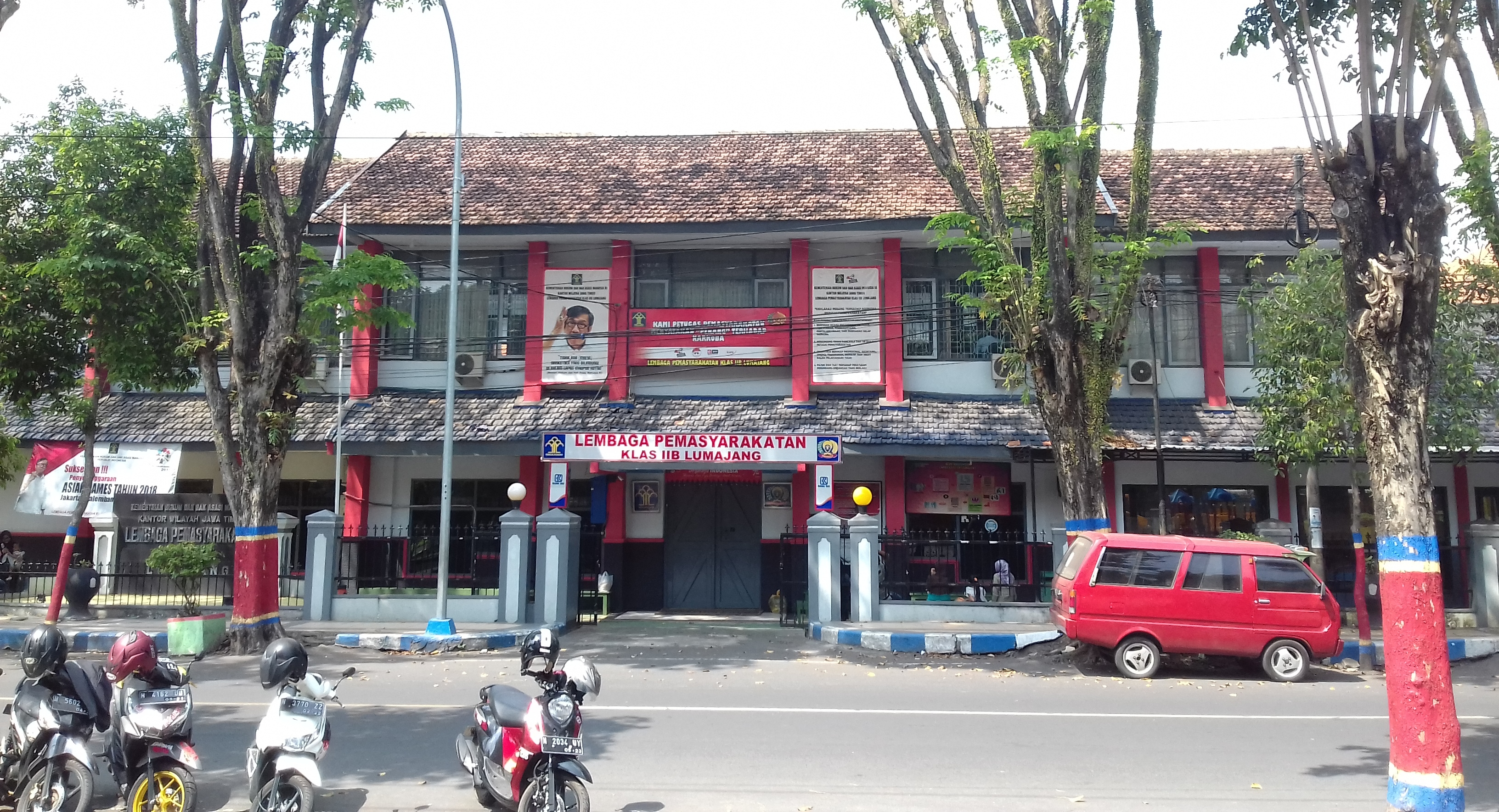 Tampak depan Lembaga Pemasyarakatan Klas IIB Lumajang